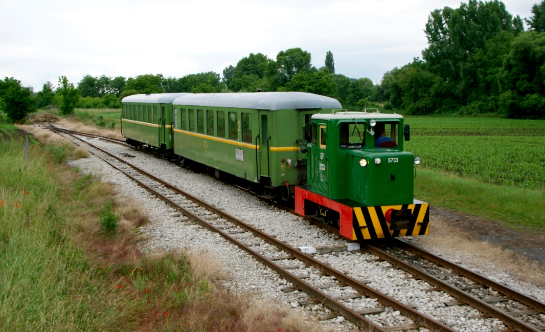 Személyvonat Somogyszentpál GV állomáson (Balatonfenyvesi Gazdasági Vasúton)